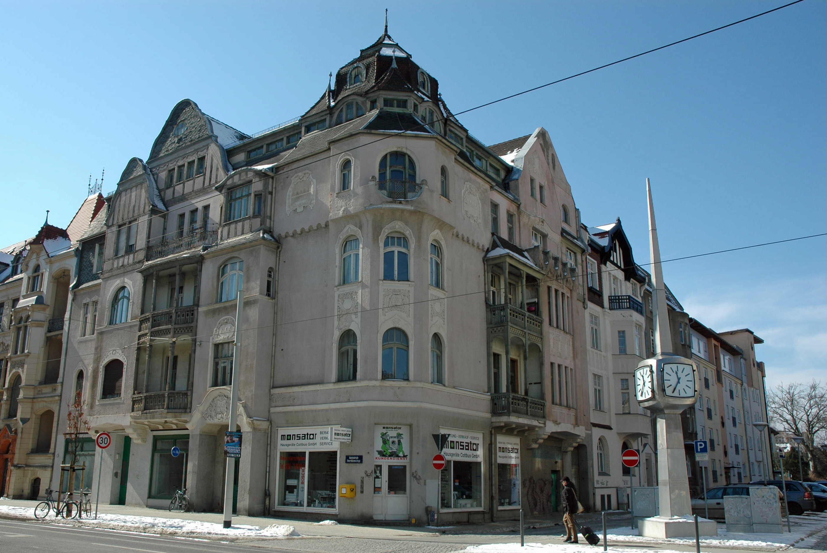 Bahnhofstraße 51, Ansicht 1